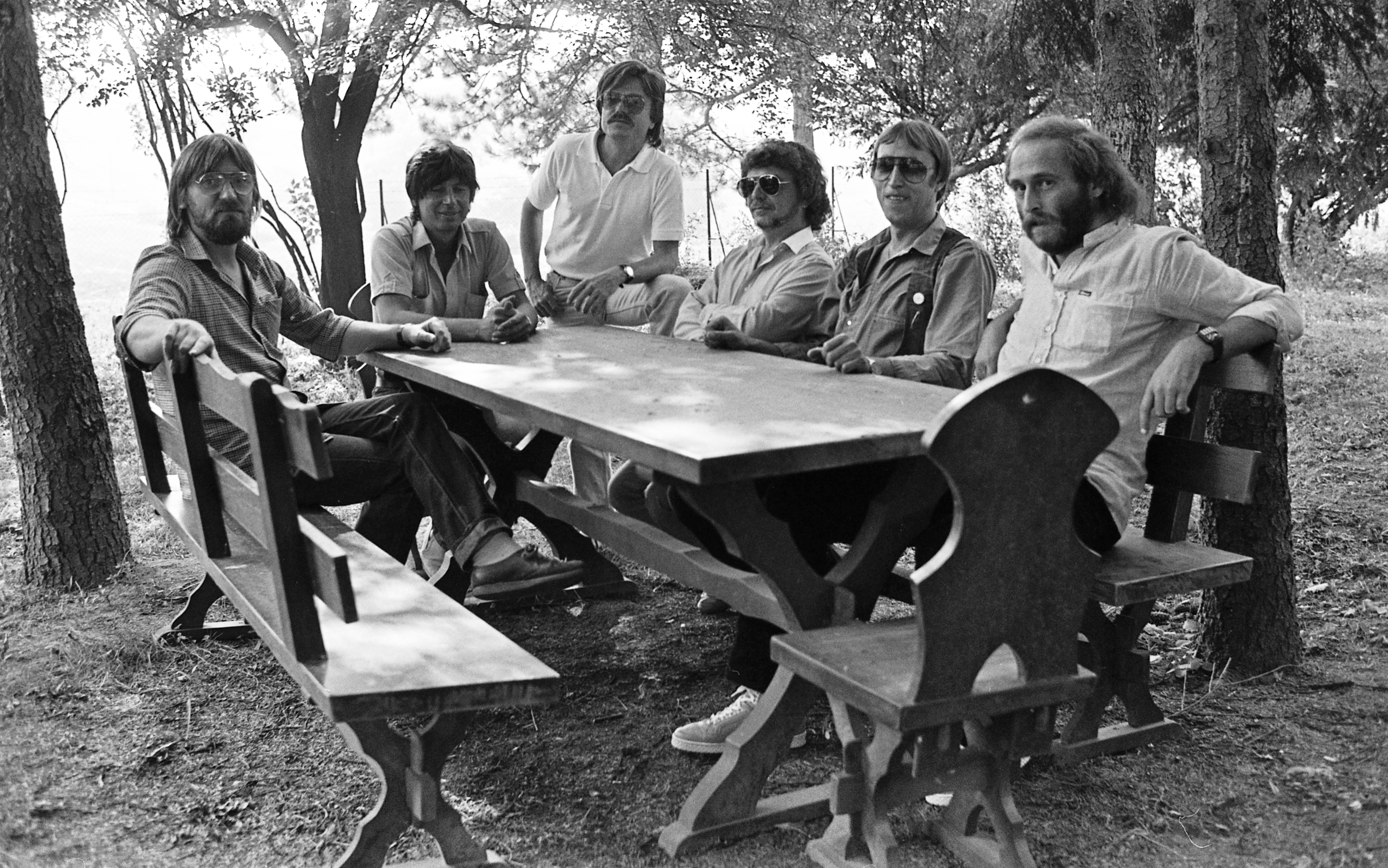 A Fonográf együttes: balról Tolcsvay László, Bródy János, Szörényi Levente, Szörényi Szabolcs, Németh Oszkár és Móricz Mihály.